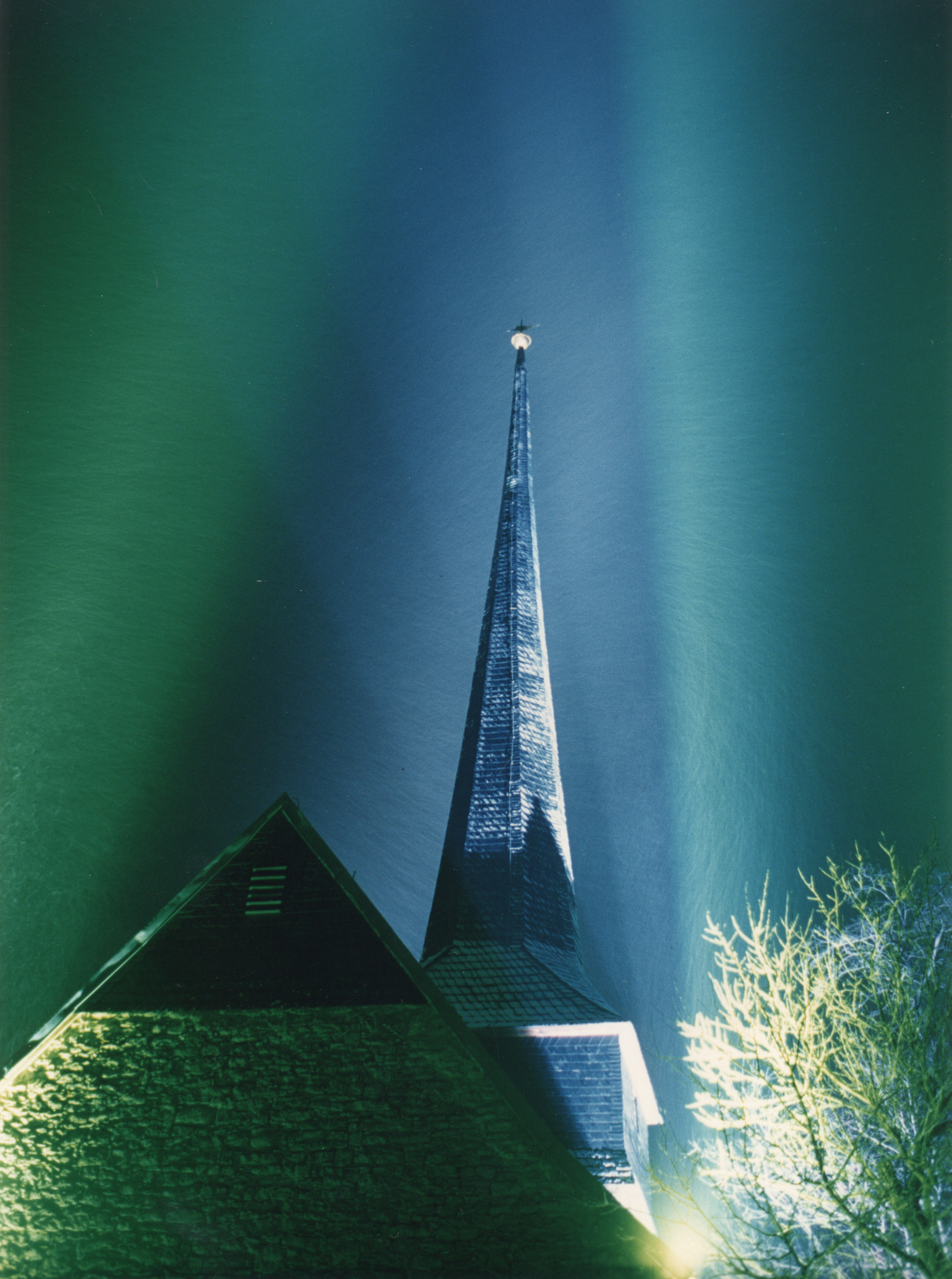 Lichtskulptur Gelmeroda Turm, Foto Peter Mittmann